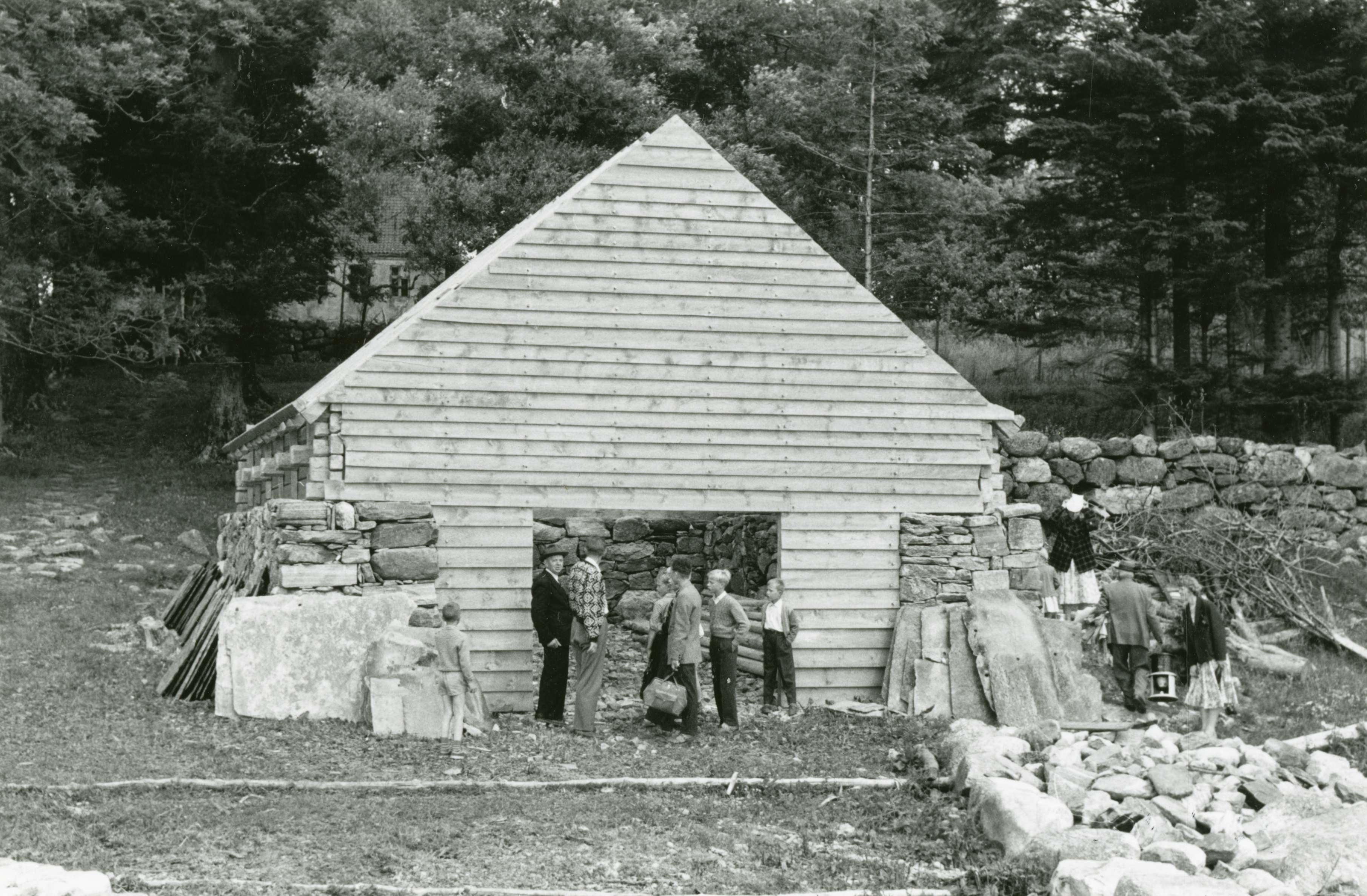 Halsnøy kloster i Eid, Hordaland Naust gjenoppført 1959. Vest for klosteret. This image on crowdsourcing geotagging platform Fotodugnad